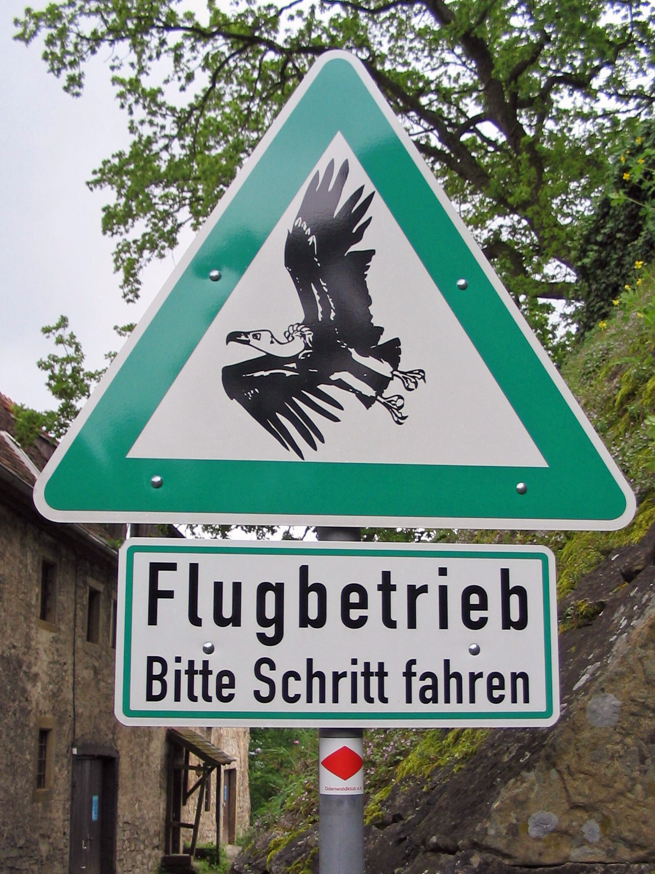 Warnschëld op der Buerg Gutterberg